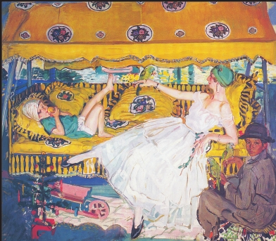 Nire emaztea eta nire alaba gelan, A. Ortiz Etxague